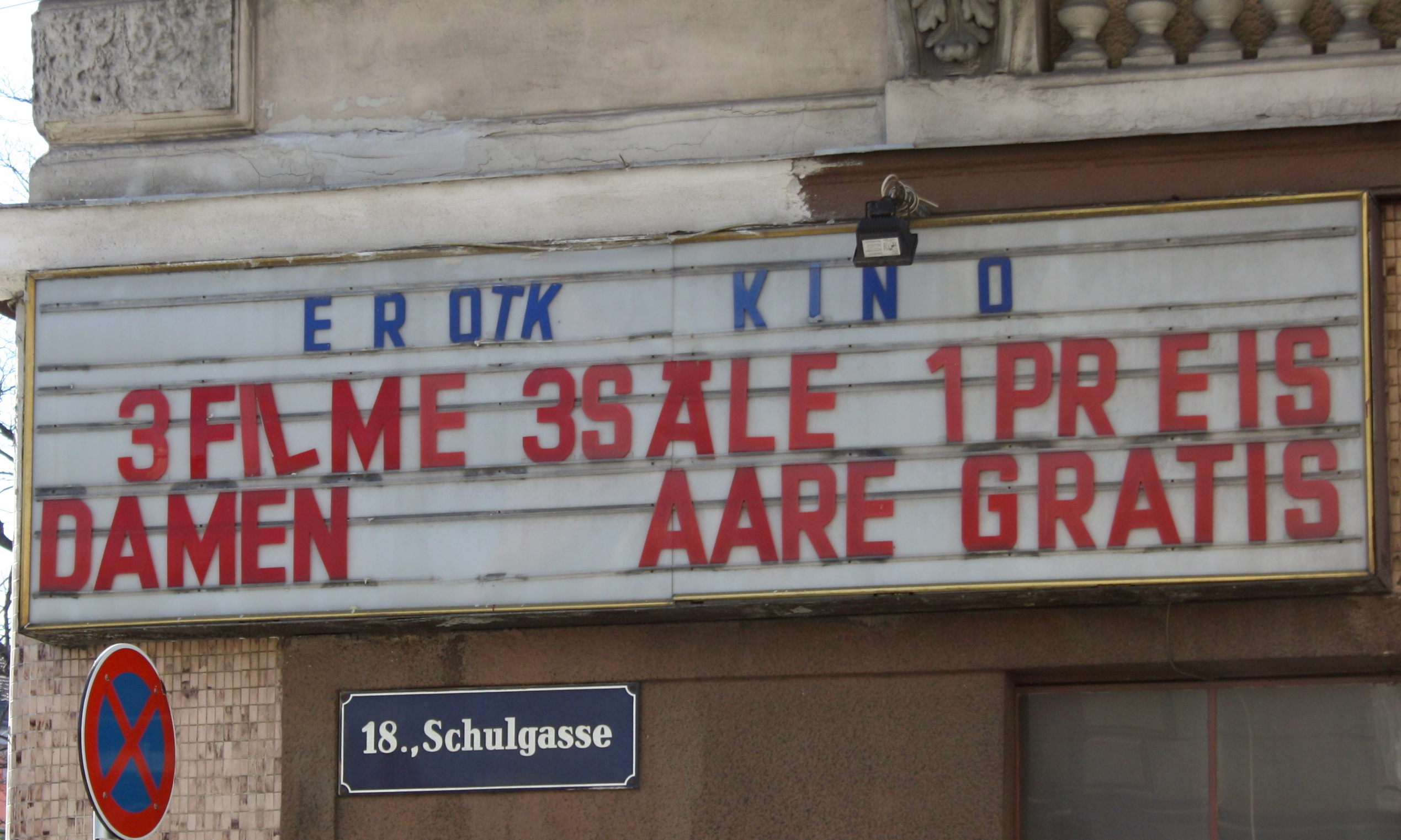 Währinger-Gürtel-Kino. Schulgasse 1 / Währinger Gürtel 83, Wien-Währing.